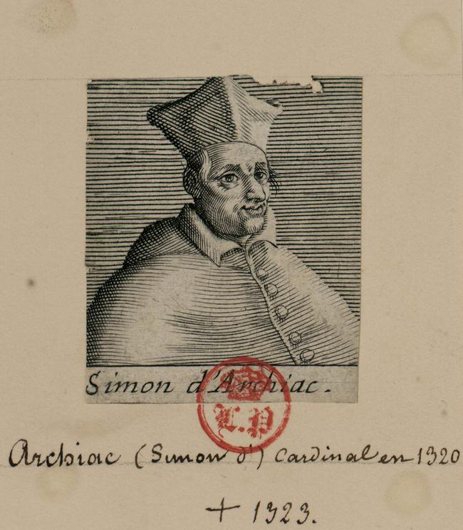 Cardinal Simon d'Archiac